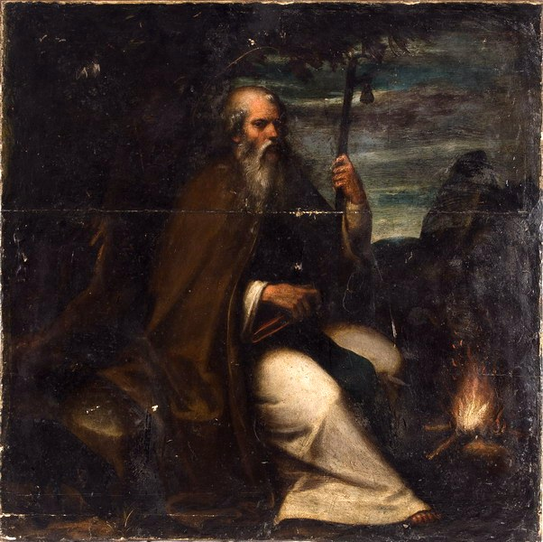 "San Antonio Abad" por Joan Sarinyena (1545-1619). Colección Joan J. Gavara (Valencia)